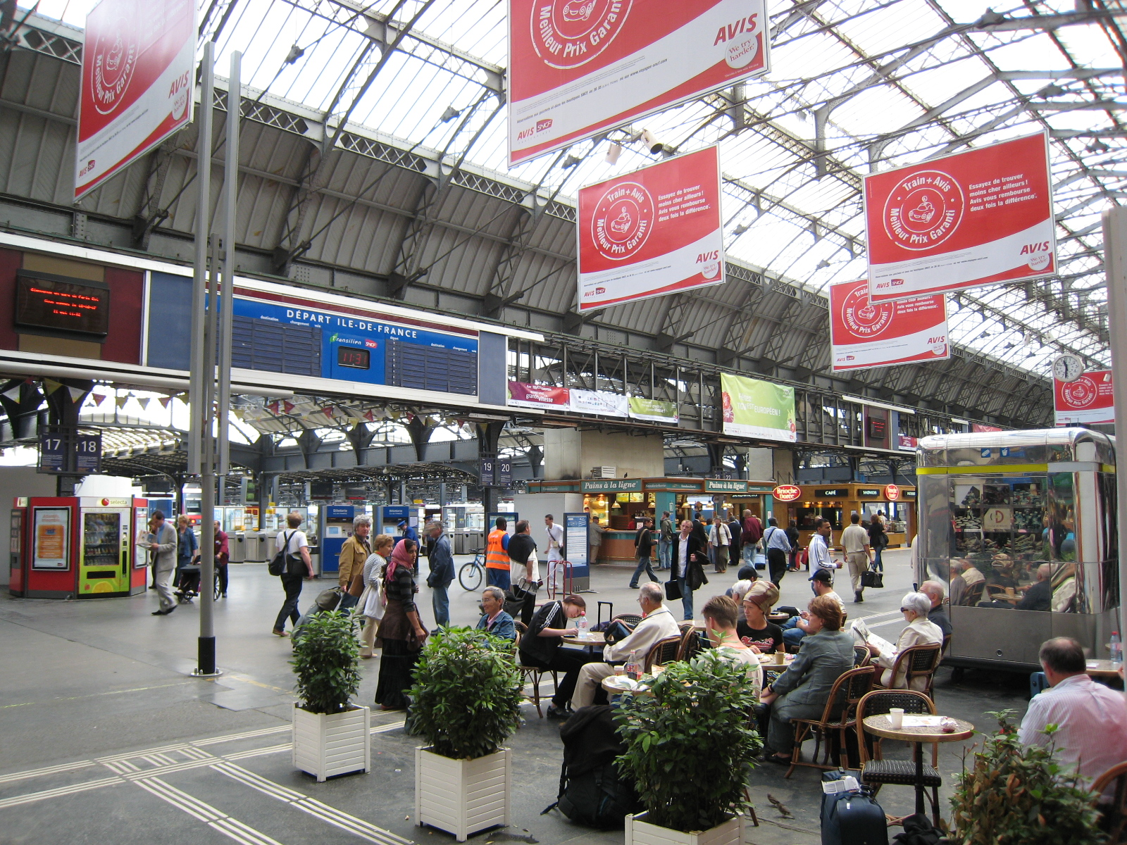 Le hall principal (grande verrière) de la Gare de l'Est, durant la rénovation suite à l'ouverture de la ligne TGV-Est européen. Les anciens panneaux à affichage rotatif sont désactivés, et le bandeau intermédiaire datant des années 1970 est en cours de démontage.